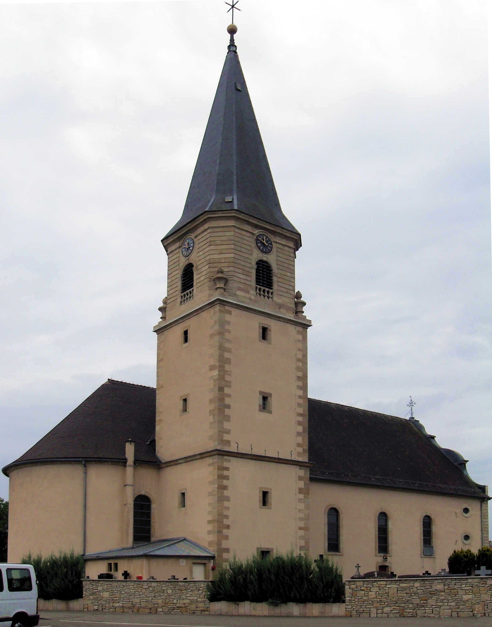 L'église Saint-Jean-Baptiste d'Hirsingue